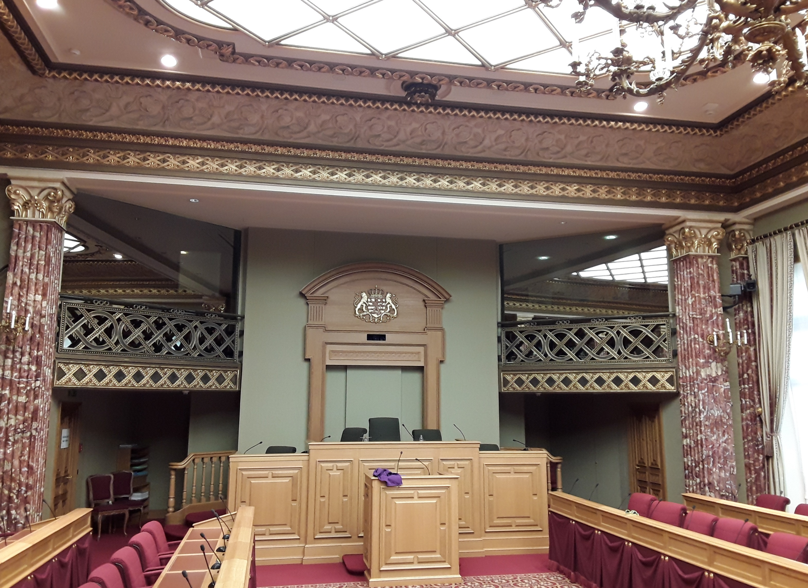 À l'intérieur de l'Hôtel de la Chambre des Députés à Luxembourg. La salle plénière; vue sur la tribune du Président.